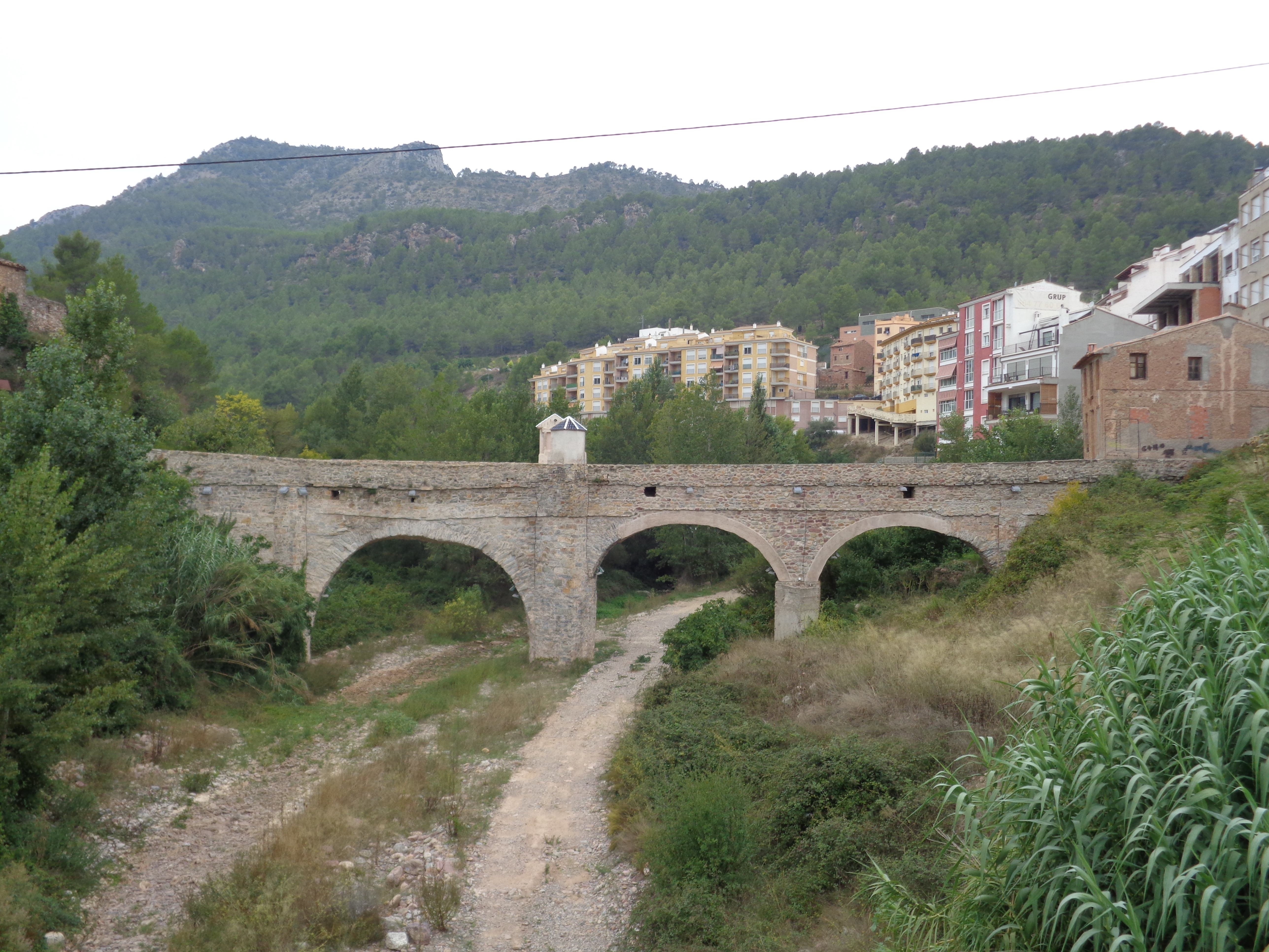 Montanejos. 08.079-005. 08.079-E07.